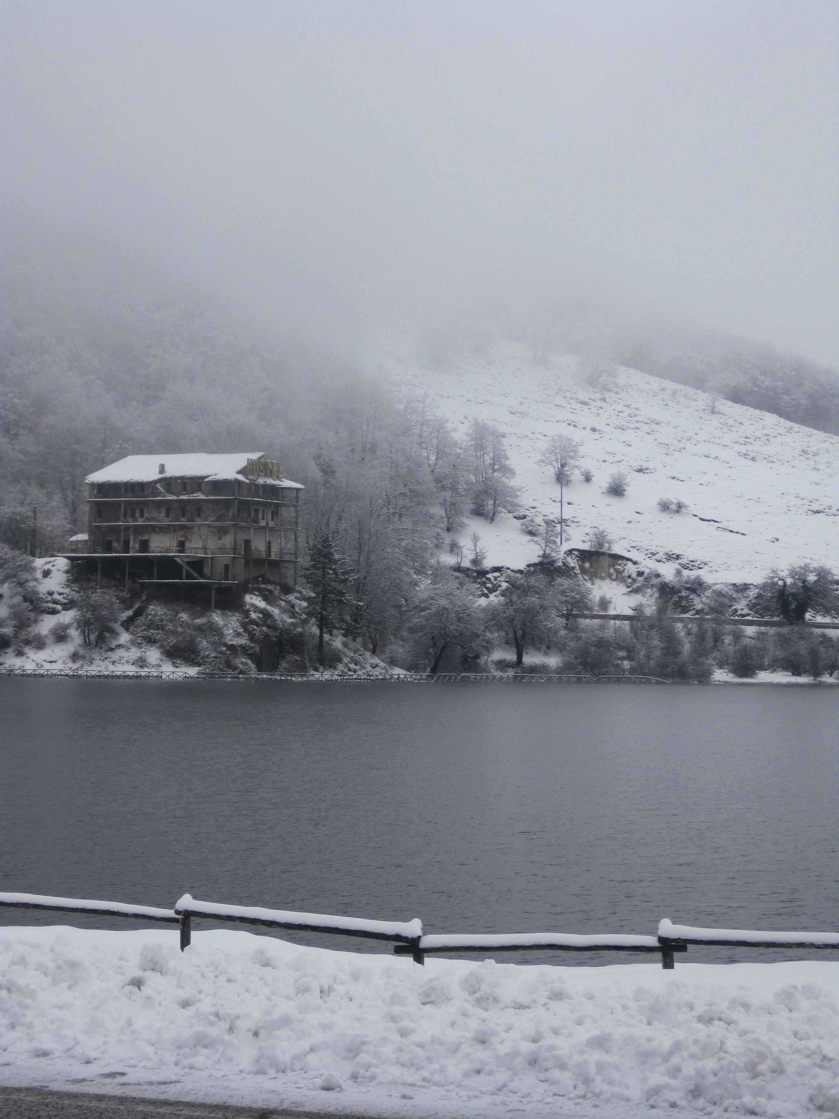 Foto scattata da me il 24 Gennaio 2011 in occasione di un soggiorno nella località. Posto la foto perchè è venuta particolarmente nitida.